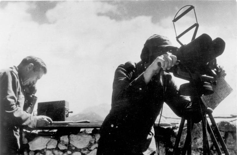 Eine Jäger-Leitstelle. Aufmerksam wird der Luftraum beobachtet und den deutschen Jagdfliegern die Lage übermittelt. Wenn der feindliche Verband durch die angreifenden Jäger gesprengt ist, werden die Jagdflieger auf neue Ziele eingewiesen.